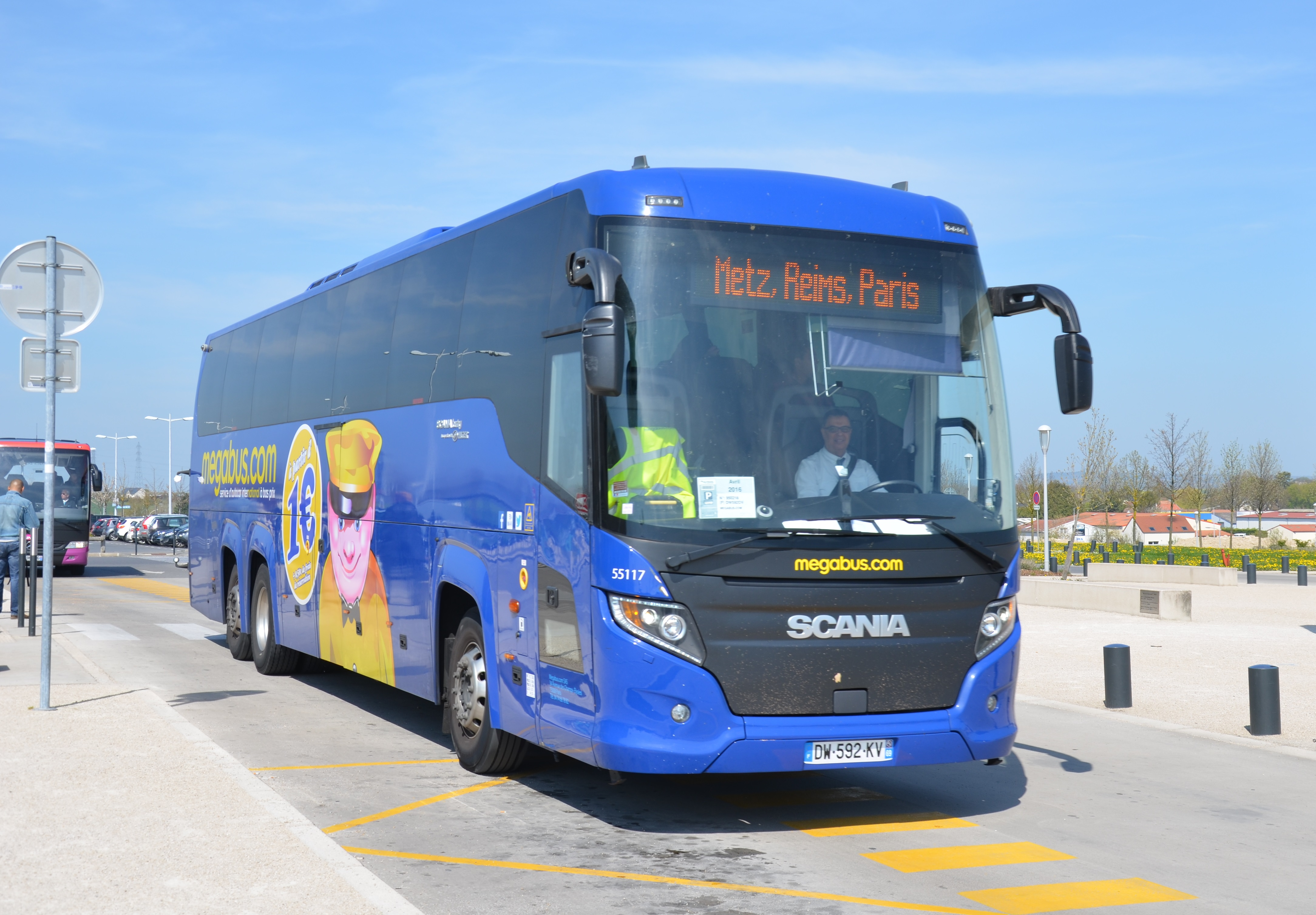 Scania Touring de la compagnie Megabus France, en gare de Champagne Ardenne TGV (près de Reims), en avril 2016.